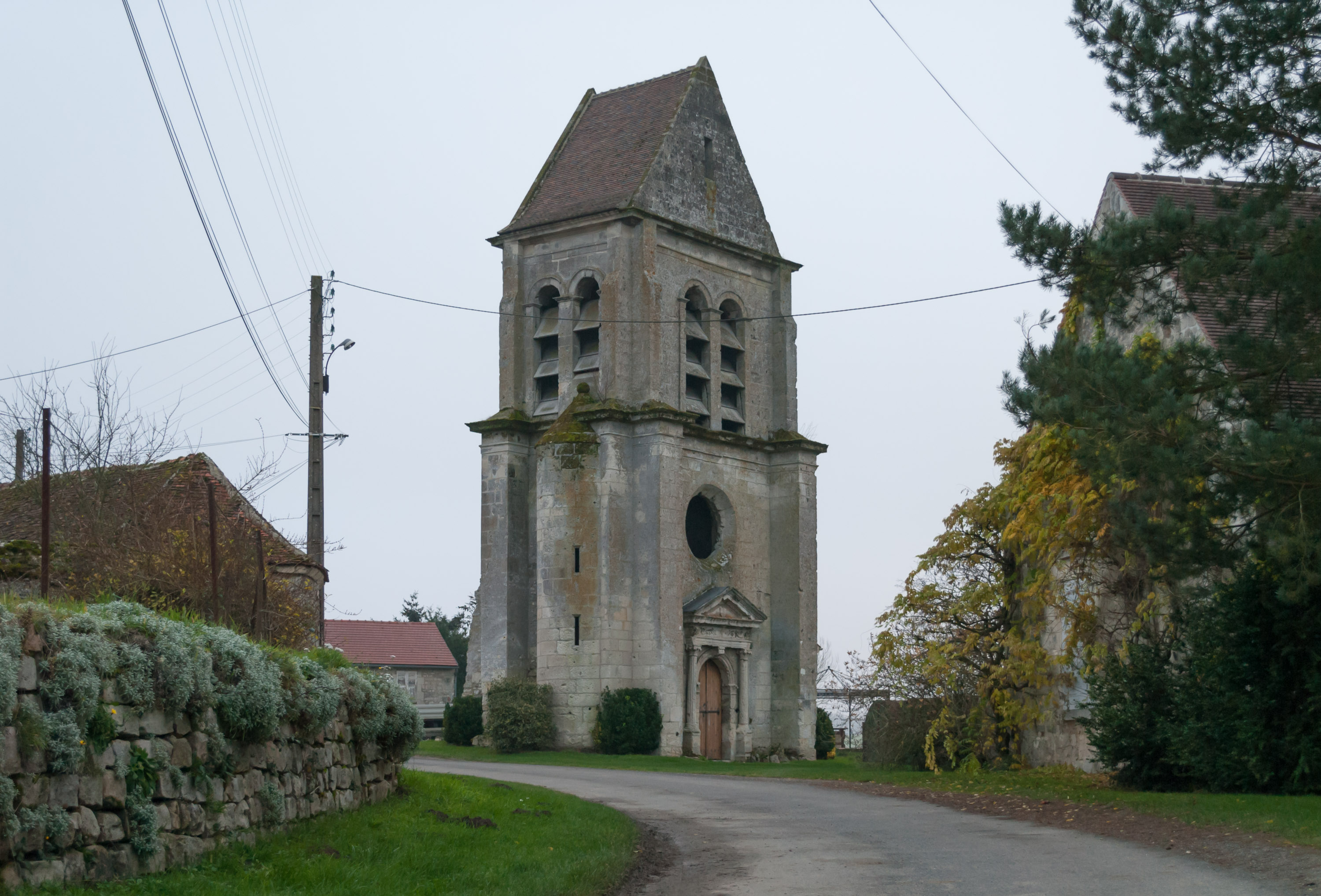 Église Saint-Rémi de Parcy